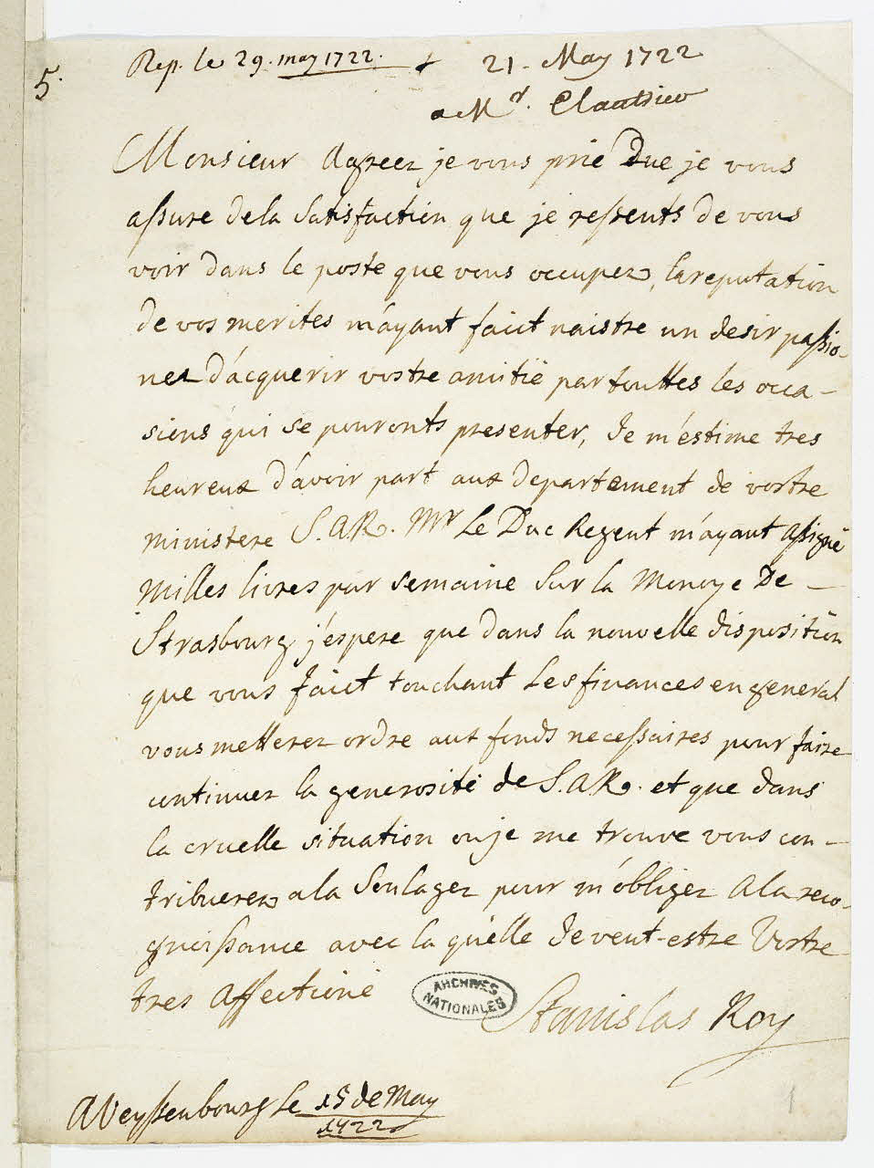 Lettre autographe de Stanislas Leszczynski faisant état de l'assignation à lui faite par le Régent de 1000 livres par semaine sur la monnaie de Strasbourg. Wissembourg, 15 mai 1722.